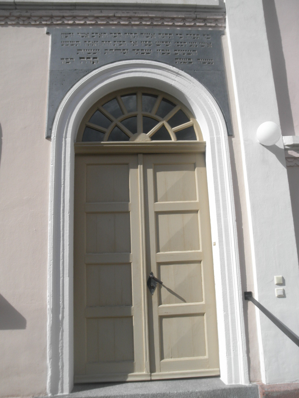 enirejo de la historia sinagogo de Hemsbach, Germanio